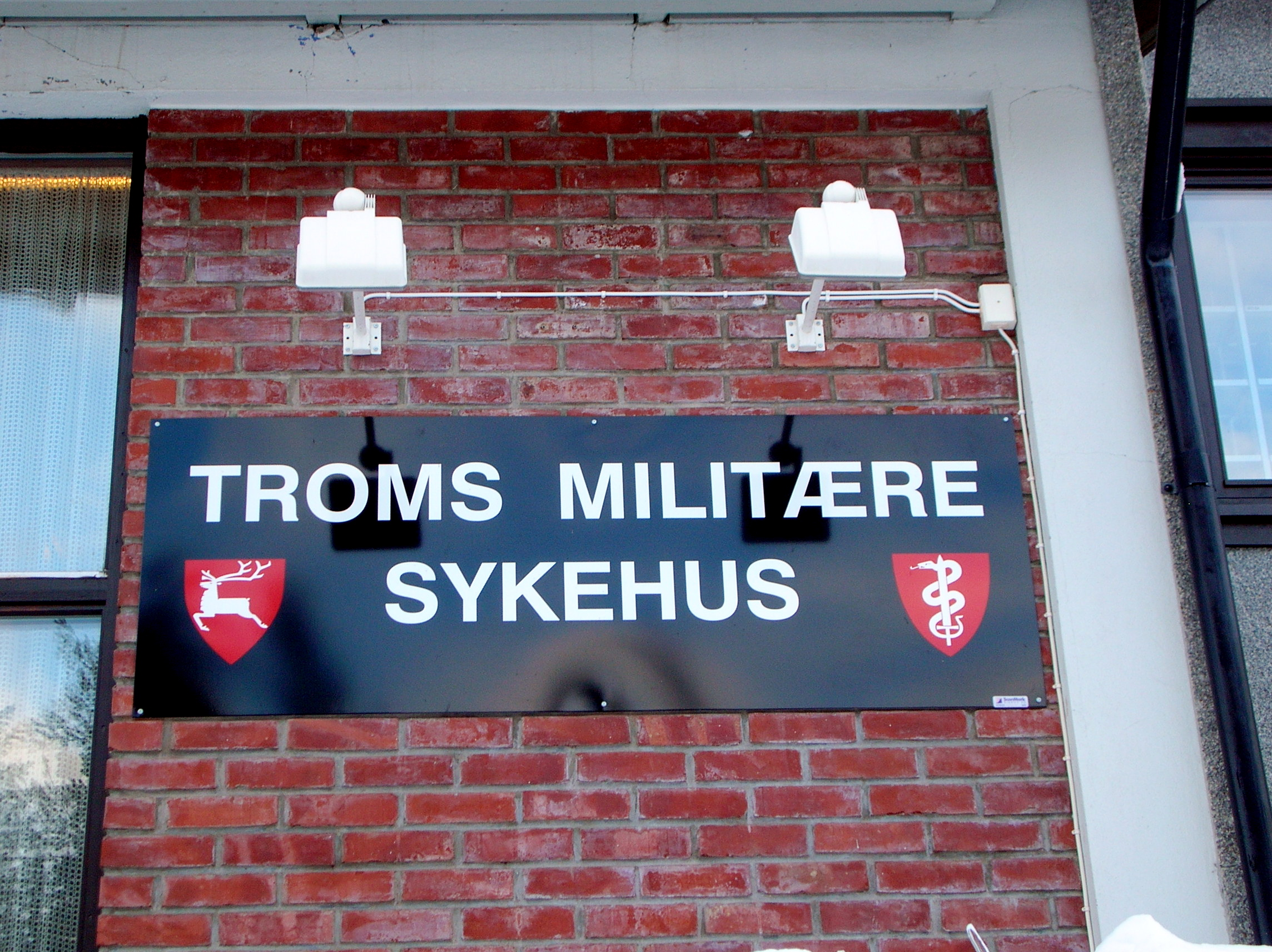 Veggskilt på Troms militære sykehus